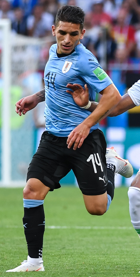 Лукас Торрейра